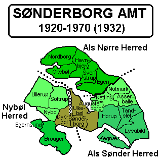 Sønderborg Amt 1920-1970. (1932). Kortet er udarbejdet af Svend-Erik Christiansen. Farvelagt af Lars Helbo - med grønne nuancer er markeret kommuner, der gik til Sønderjyllands Amt efter Kommunalreformen 1970. Map of Sønderborg County, Denmark 1920-1970. (1932). Map by Svend-Erik Christiansen. Colours by Lars Helbro. The green nuances show parts of the province that became part of South Jutland County in 1970.